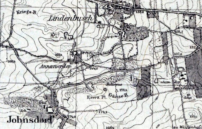 Okolice wsi Jaszków i Lipce oraz wzgórze Wąwelno, fragment mapy z 1936 r. źródło